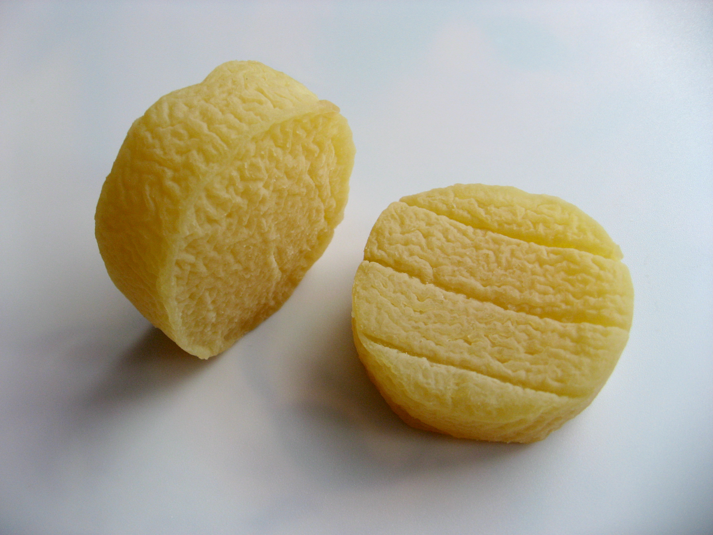 Bánovecké syrečky